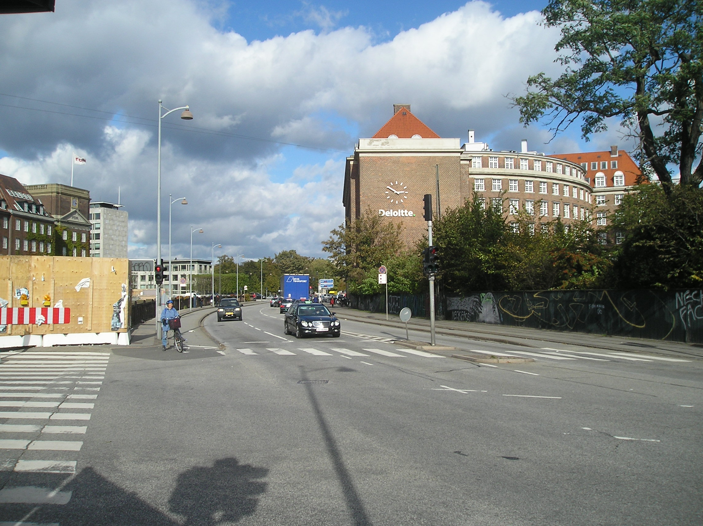 The street Hammerichsgade in Copenhagen.